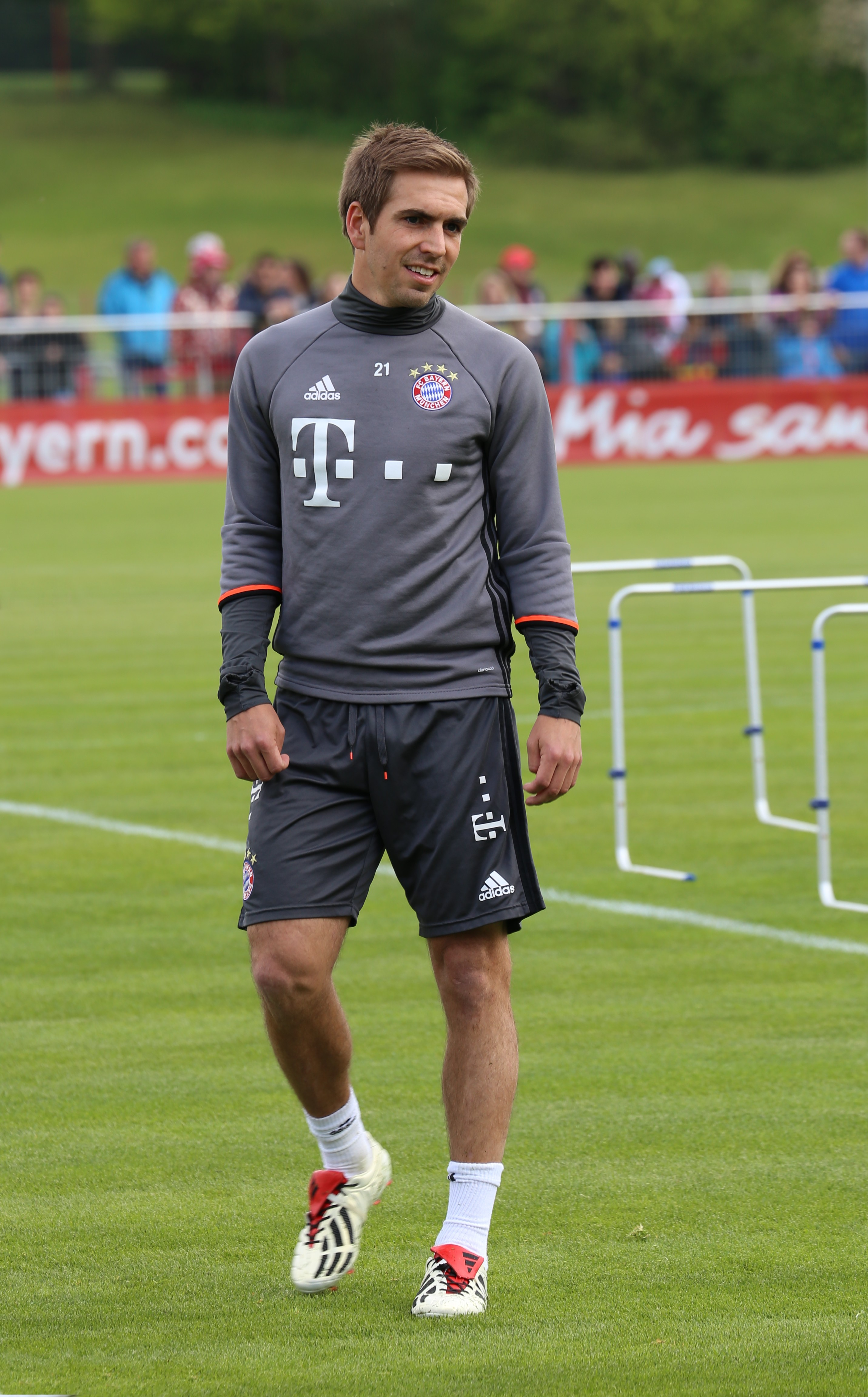 Philipp Lahm, am 3. Mai 2017 beim Training auf dem Gelände des FC Bayern München